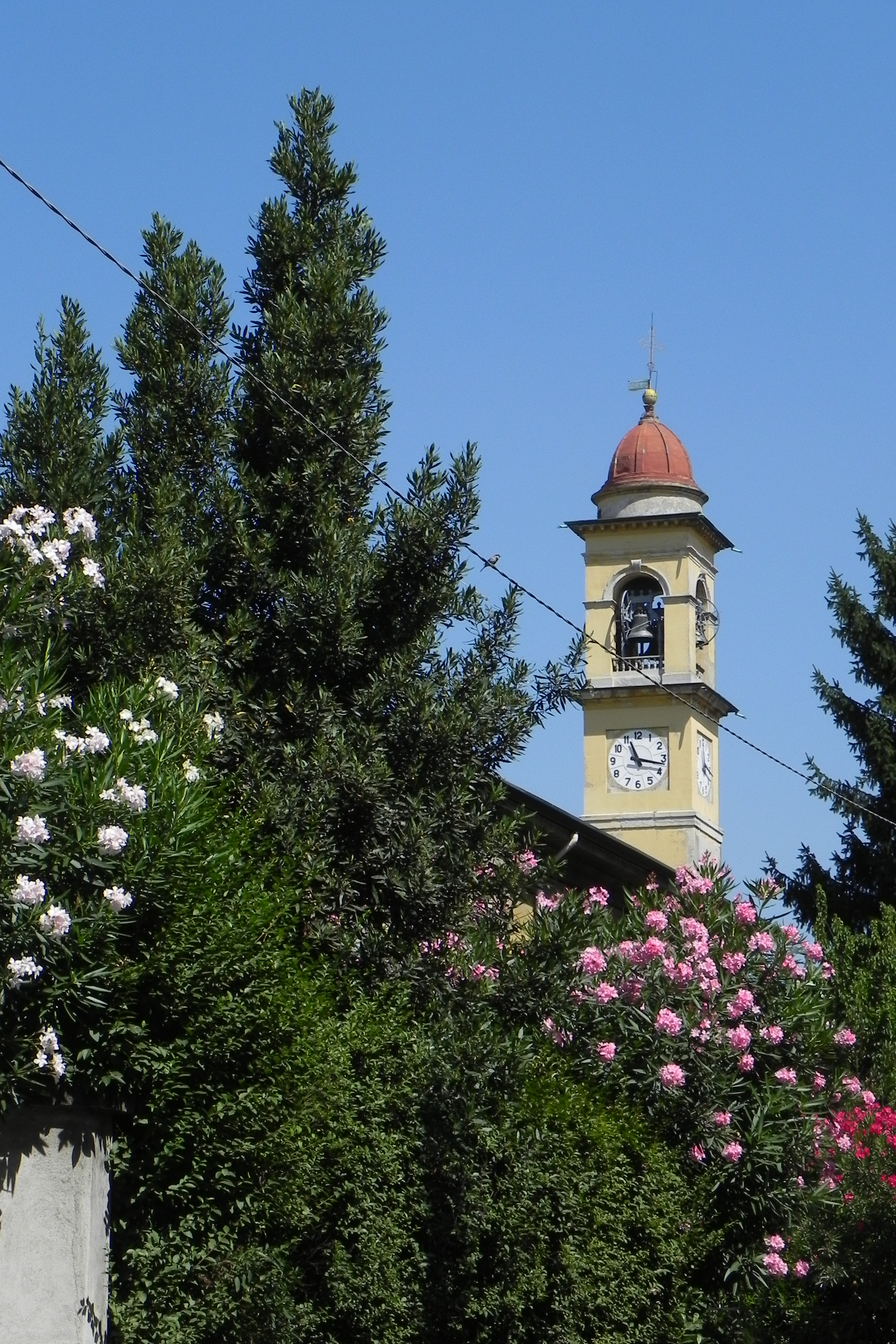 Il campanile di San Martino in Balsamo, dietro agli oleandri dell'oratorio Pio XI.